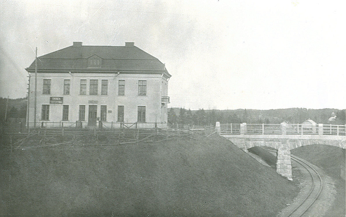 Suomen Yhdyspankki ja Karkkilan rata vanhassa valokuvassa Karkkilassa